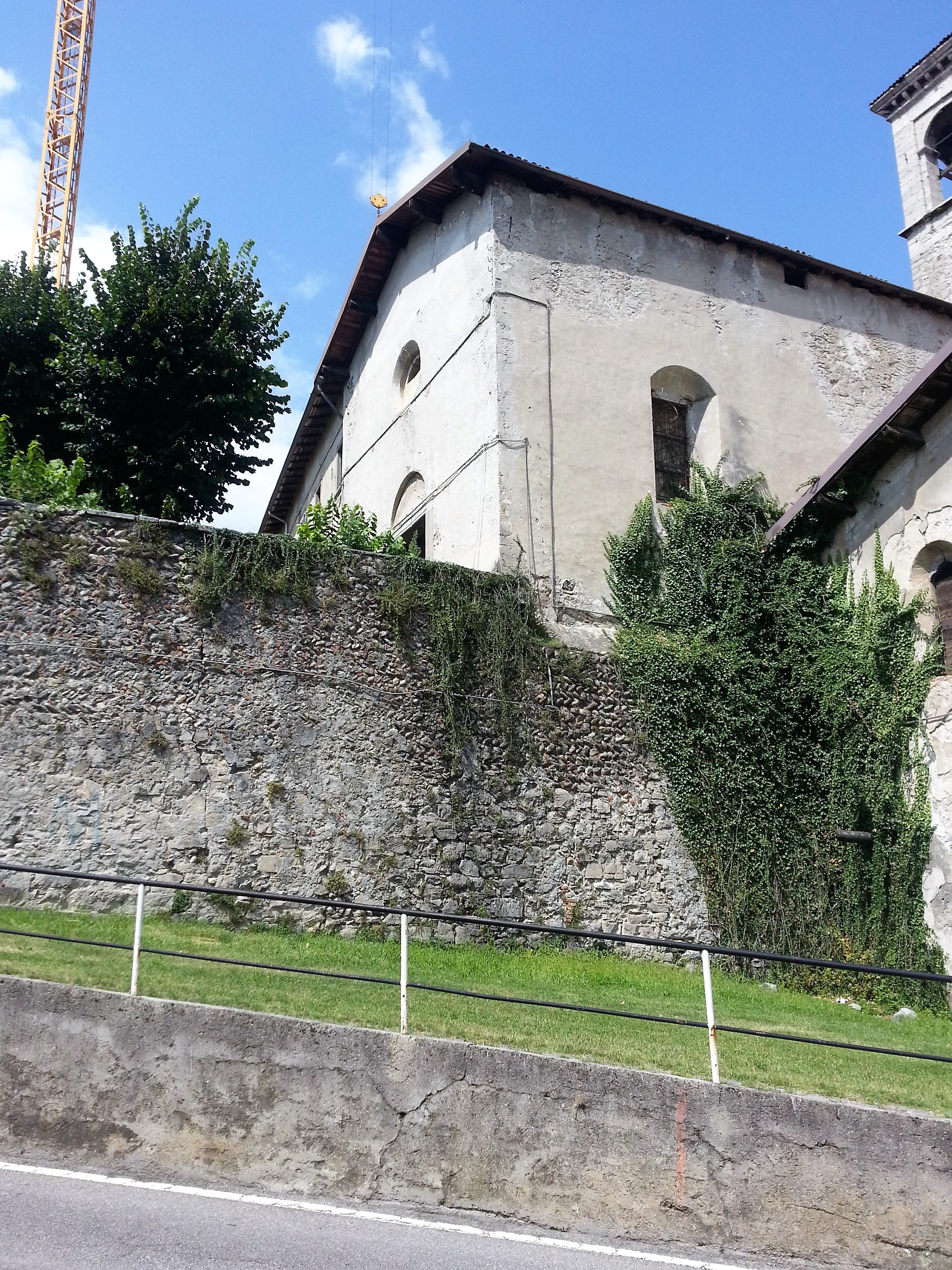 chiesa di santa Maria della Ripa di Albino